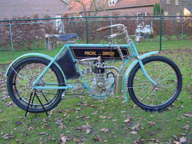 Michl Orion 1905 onbekend.